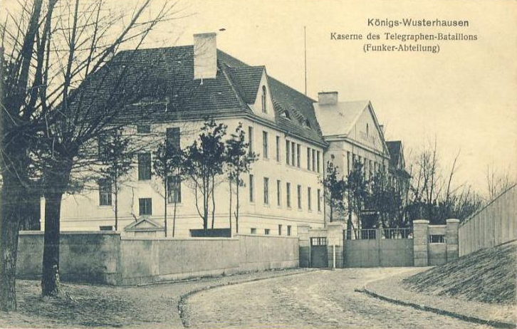 Königs Wusterhausen, Funkerberg. Ehem. Mannschaftsgebäude auf einer Ansichtskarte, um 1915.